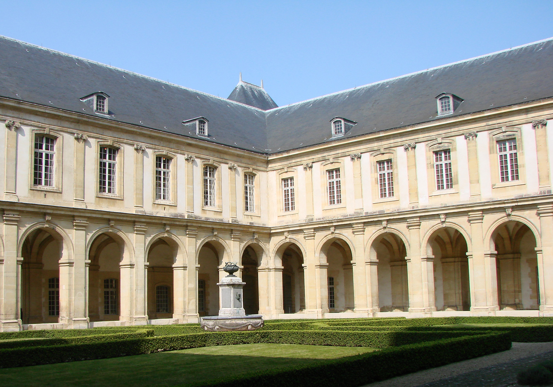 Le cloître (XVII et XVIII ème siècle).